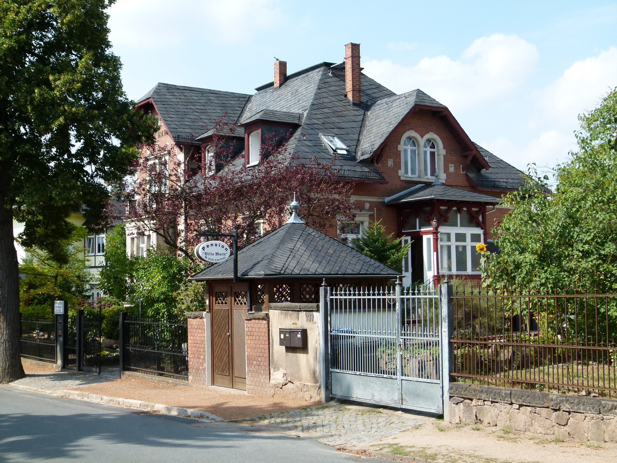 Denkmalgeschütztes Haus, Dr-Rudolf-Friedrichs-Straße 17, Radebeul, Sachsen